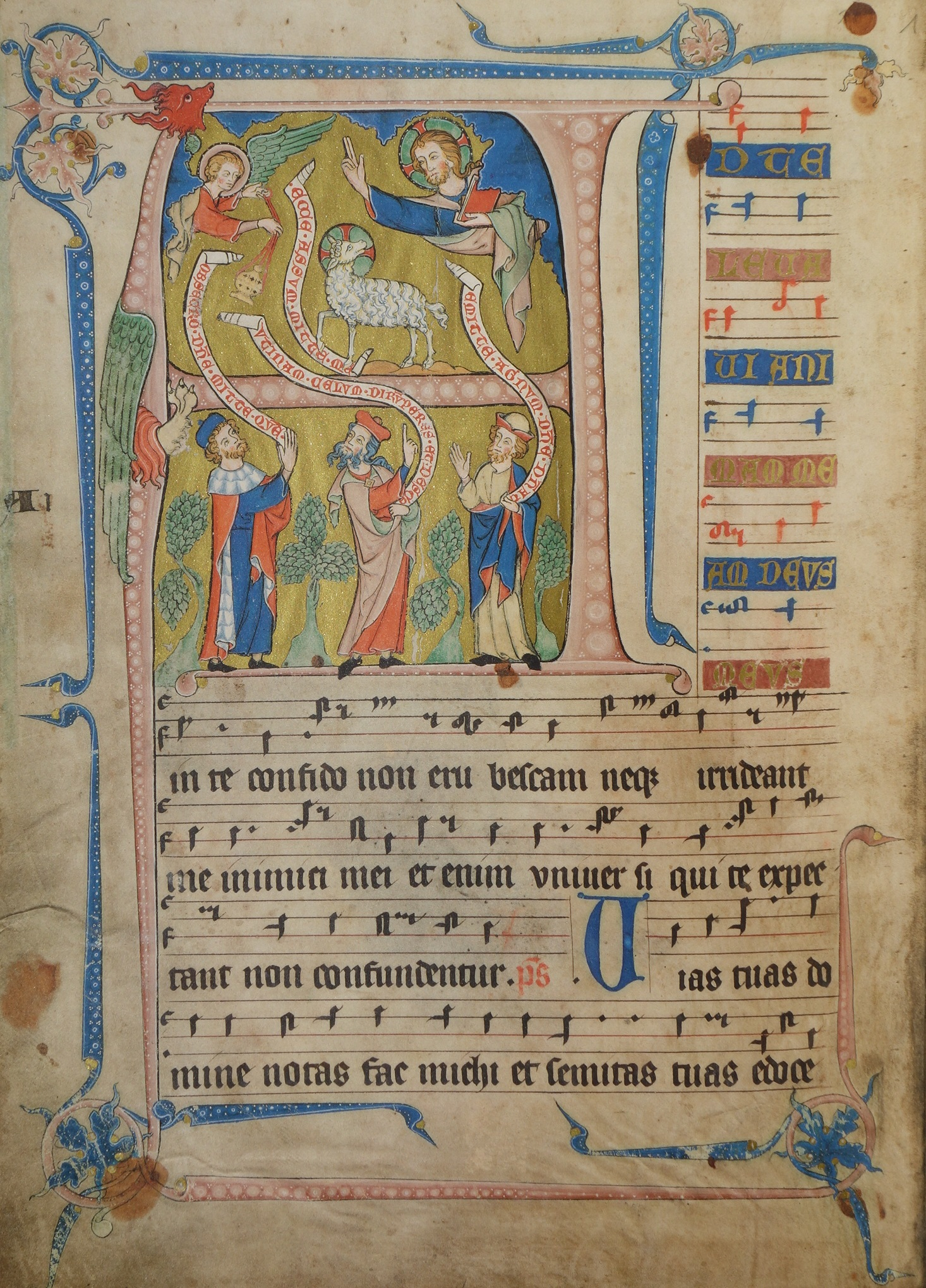 Codex Gisle, folio 1r, Introitus zum 1. Advent